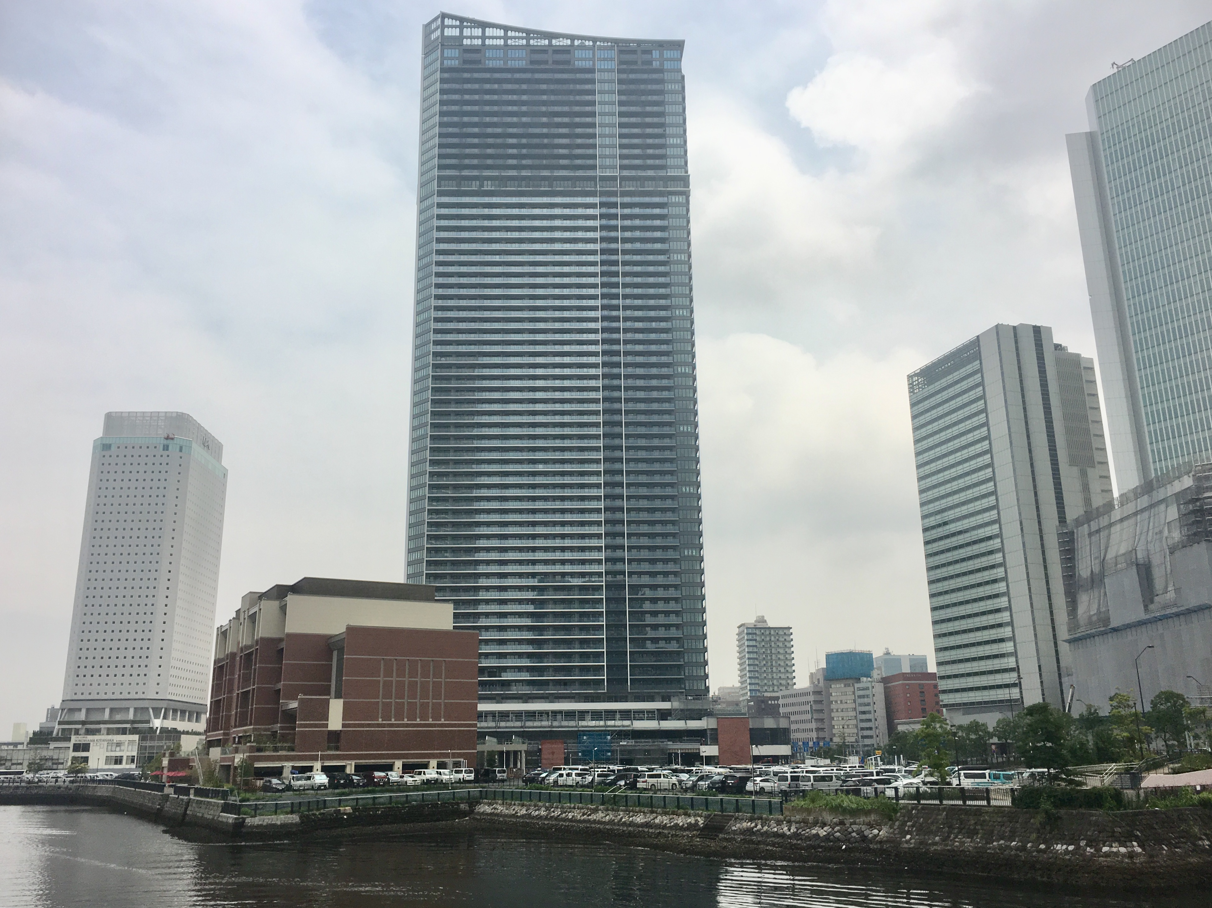 開発が進む横浜・北仲通地区（2019年7月時点）。汽車道より撮影。